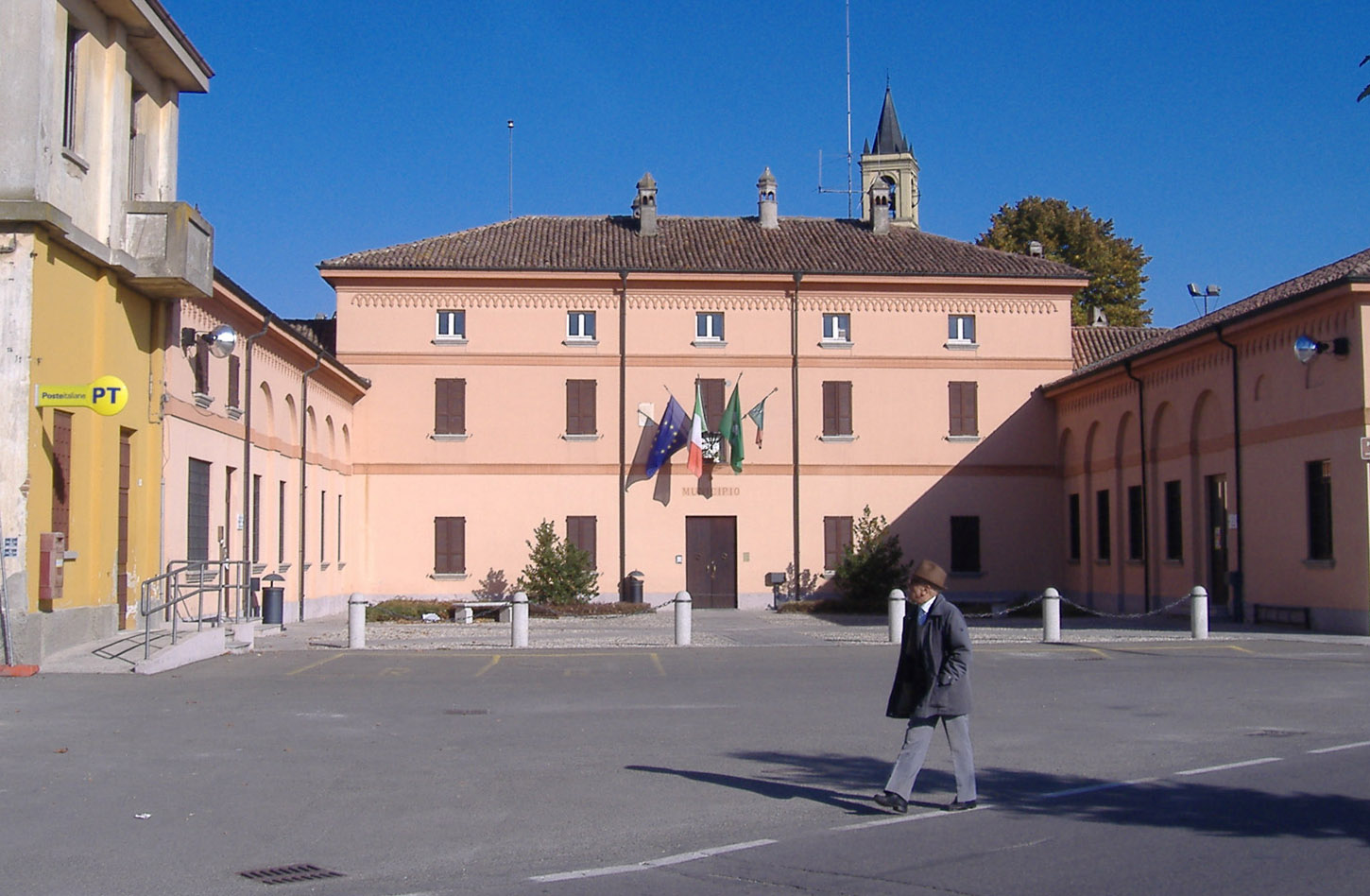 Il palazzo municipale di Caselle Landi - Italia